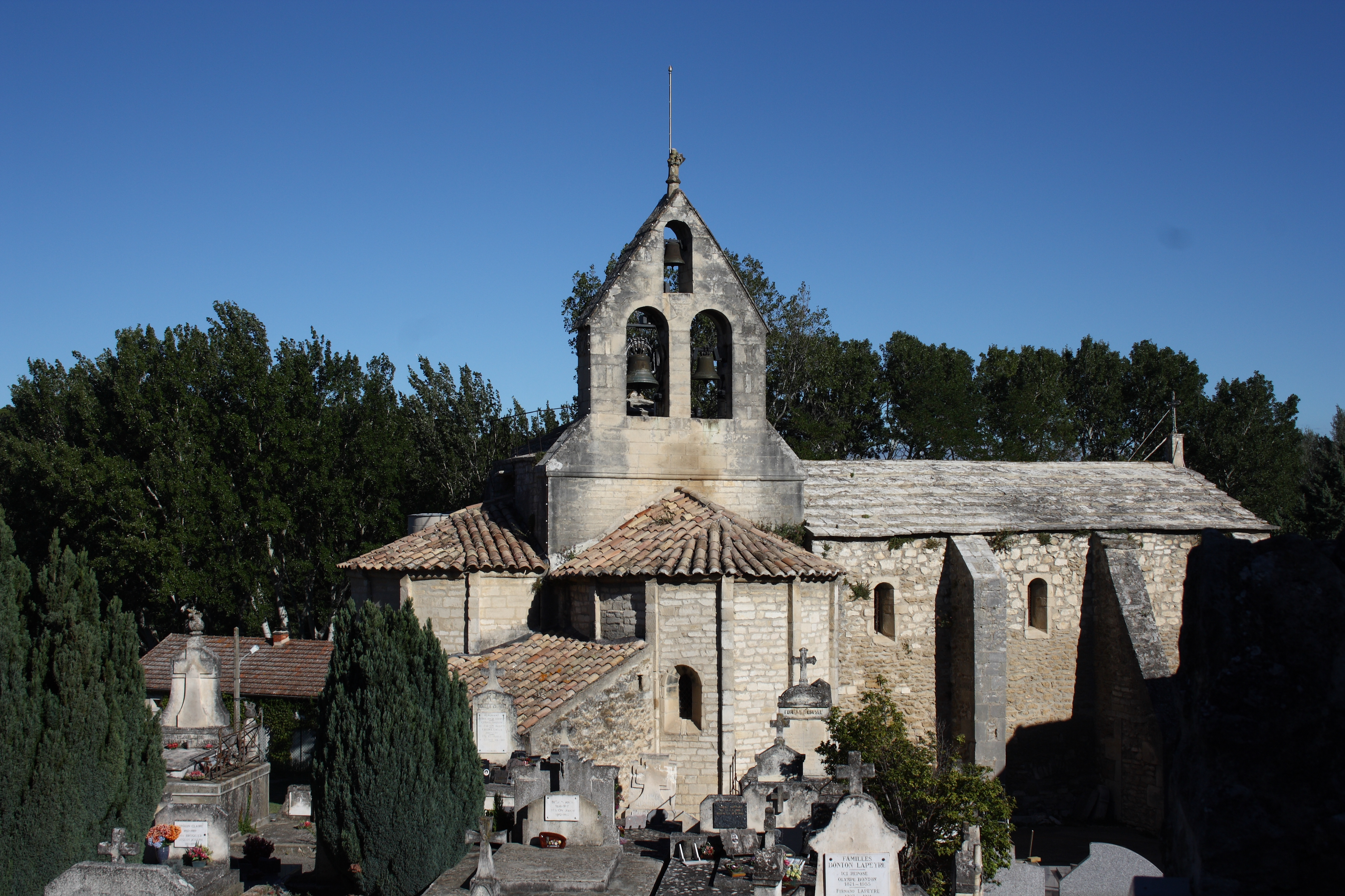 Kirche Sainte-Croix in La Baume-de-Transit